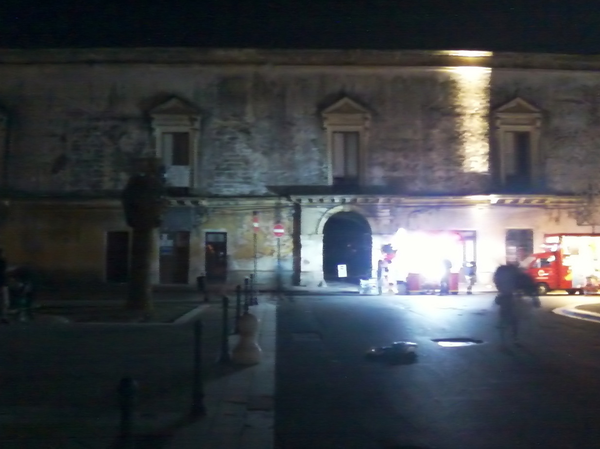 un vecchio palazzo nobiliare di novoli